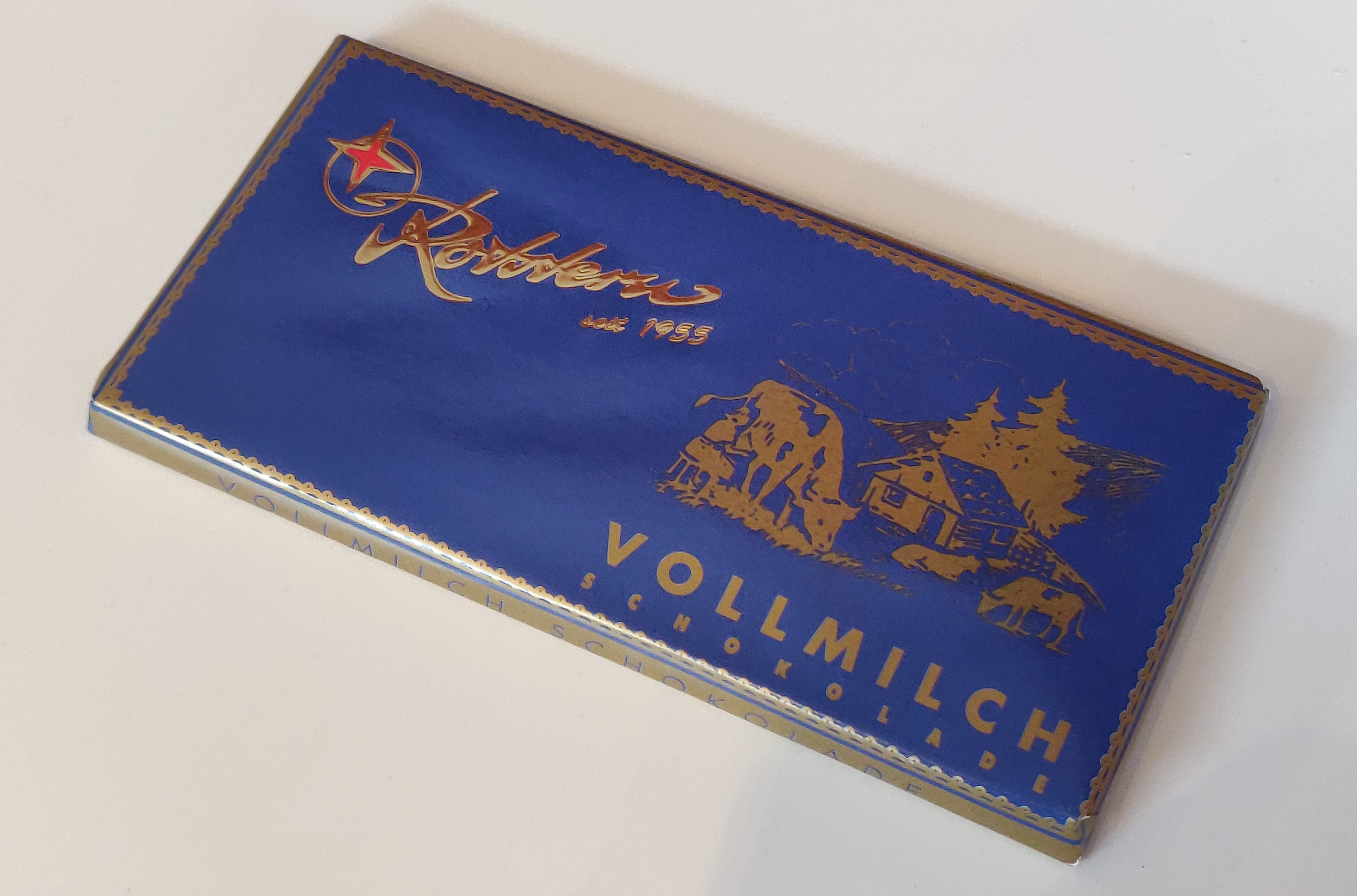 Vollmilchschokoladentafel von Rostern aus Saalfeld im Jahr 2019